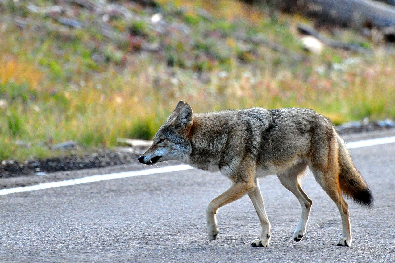 Coyote, Bandelier, Los Alamos, New Mexico.